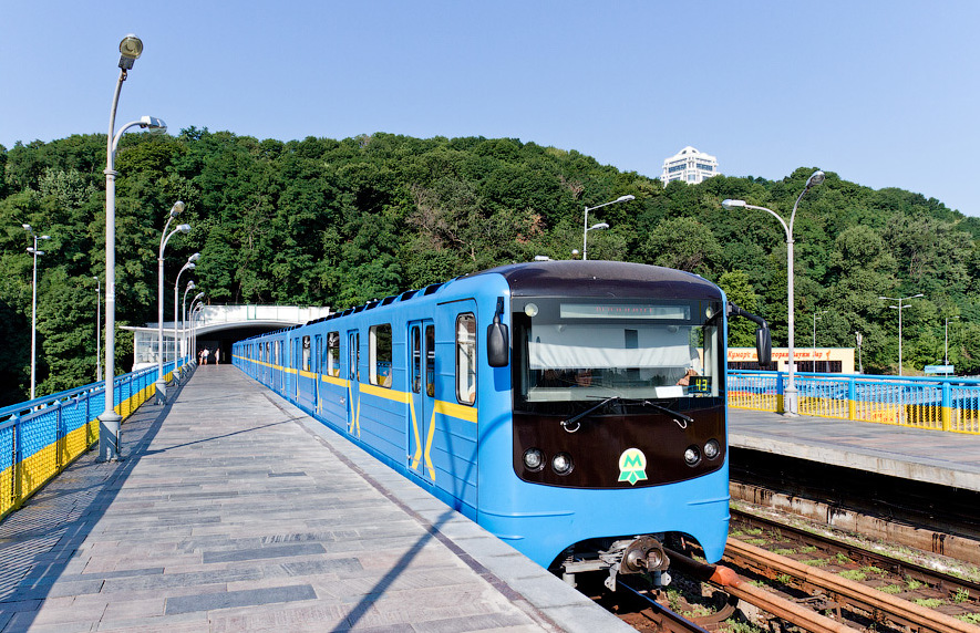 Электропоезд метро Е-КМ на станции Днепр